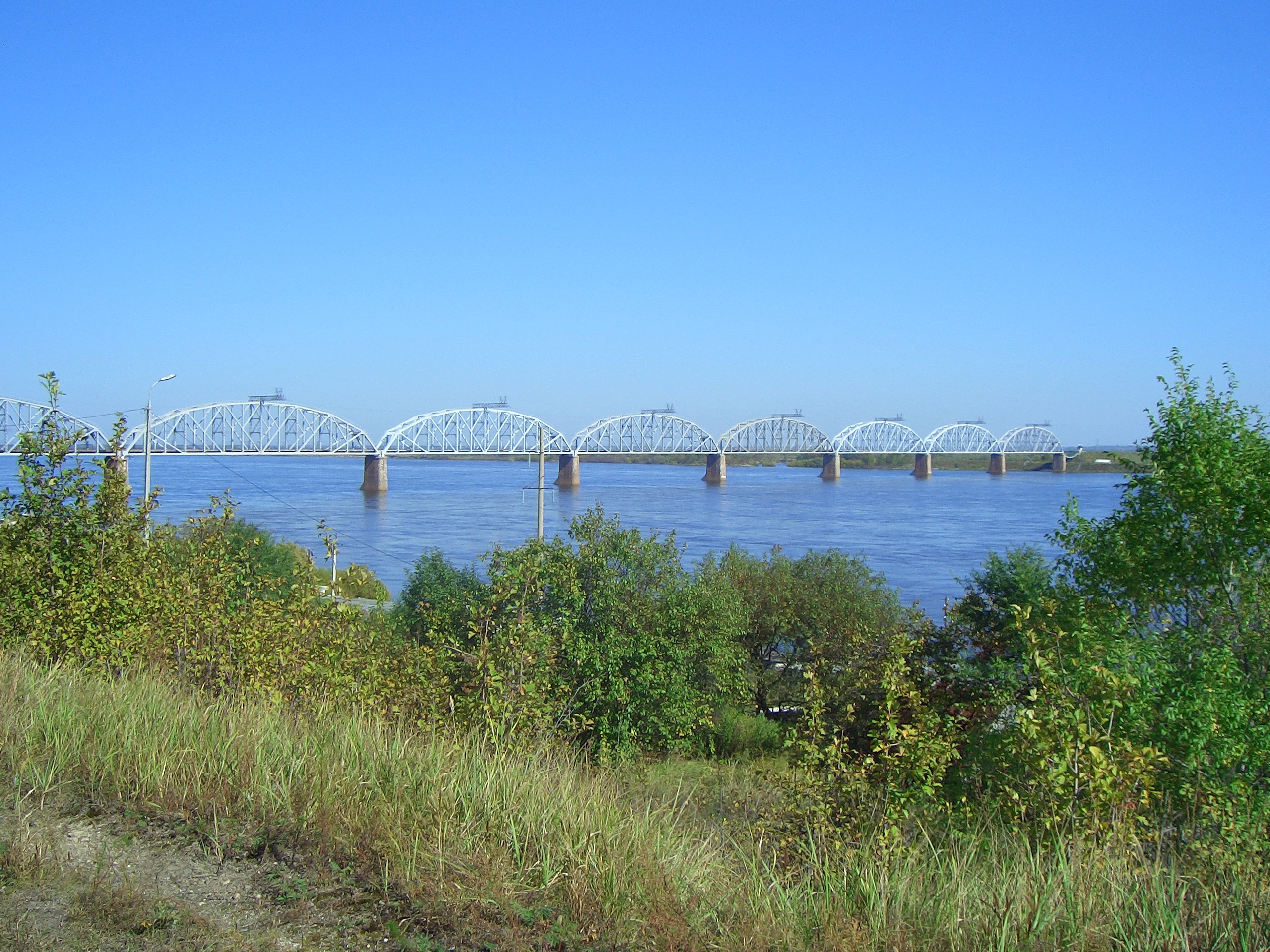 на ж/д ветке Белогорск - Благовещенск, Амурская область, Россия